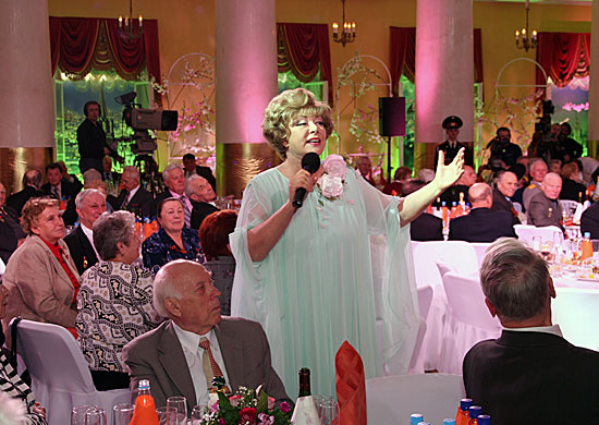 Эдита Пьеха выступает в Центральном Доме Российской Армии им. М.В. Фрунзе